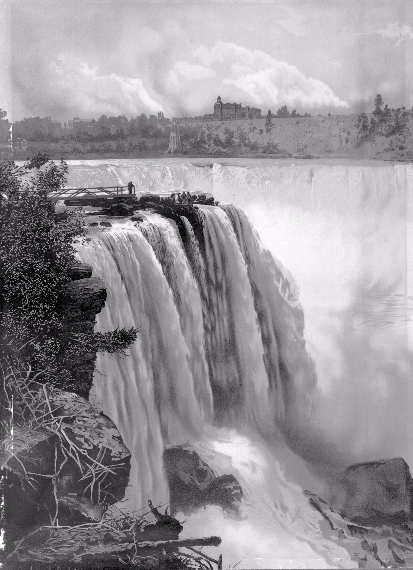 La chute du fer à cheval, à partir de l'île de la Chèvre (Goat Island), NY.